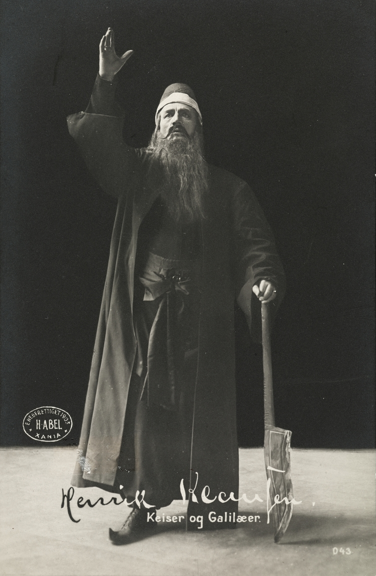 Henrik Klausen som Mystikeren Maximos i "Keiser og Galilæer" på Nationaltheatret, stående helfigur, kostyme. Utgitt i anledning Henrik Klausens 40-årsjubileum som skuespiller.